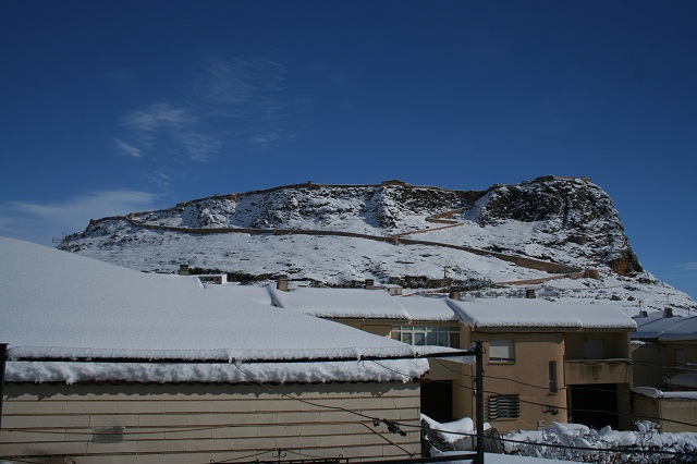 Castillo de Peñas de San Pedro, marzo de 2012